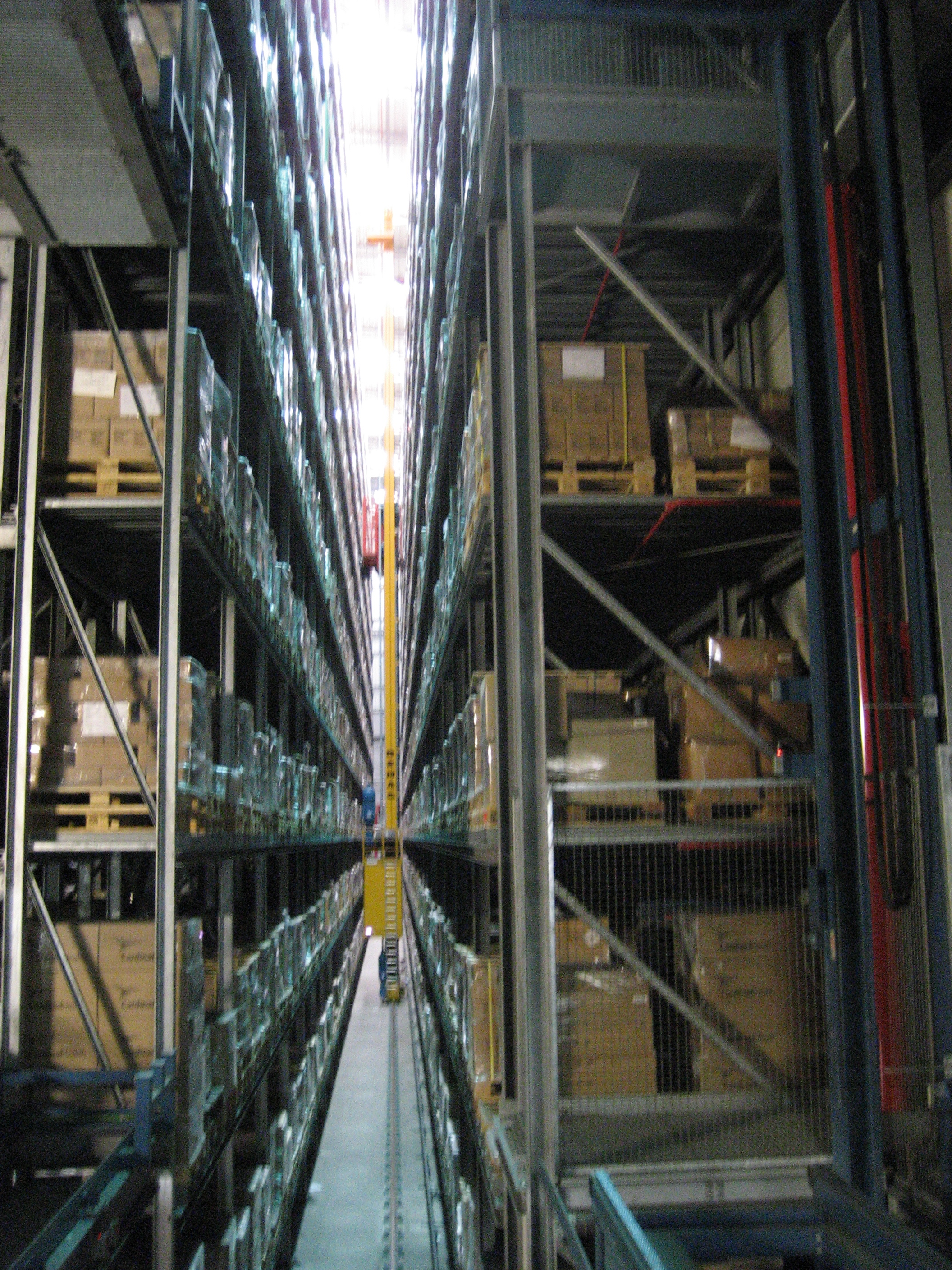 Hochregallager für Europaletten der WM-Group in Duisburg